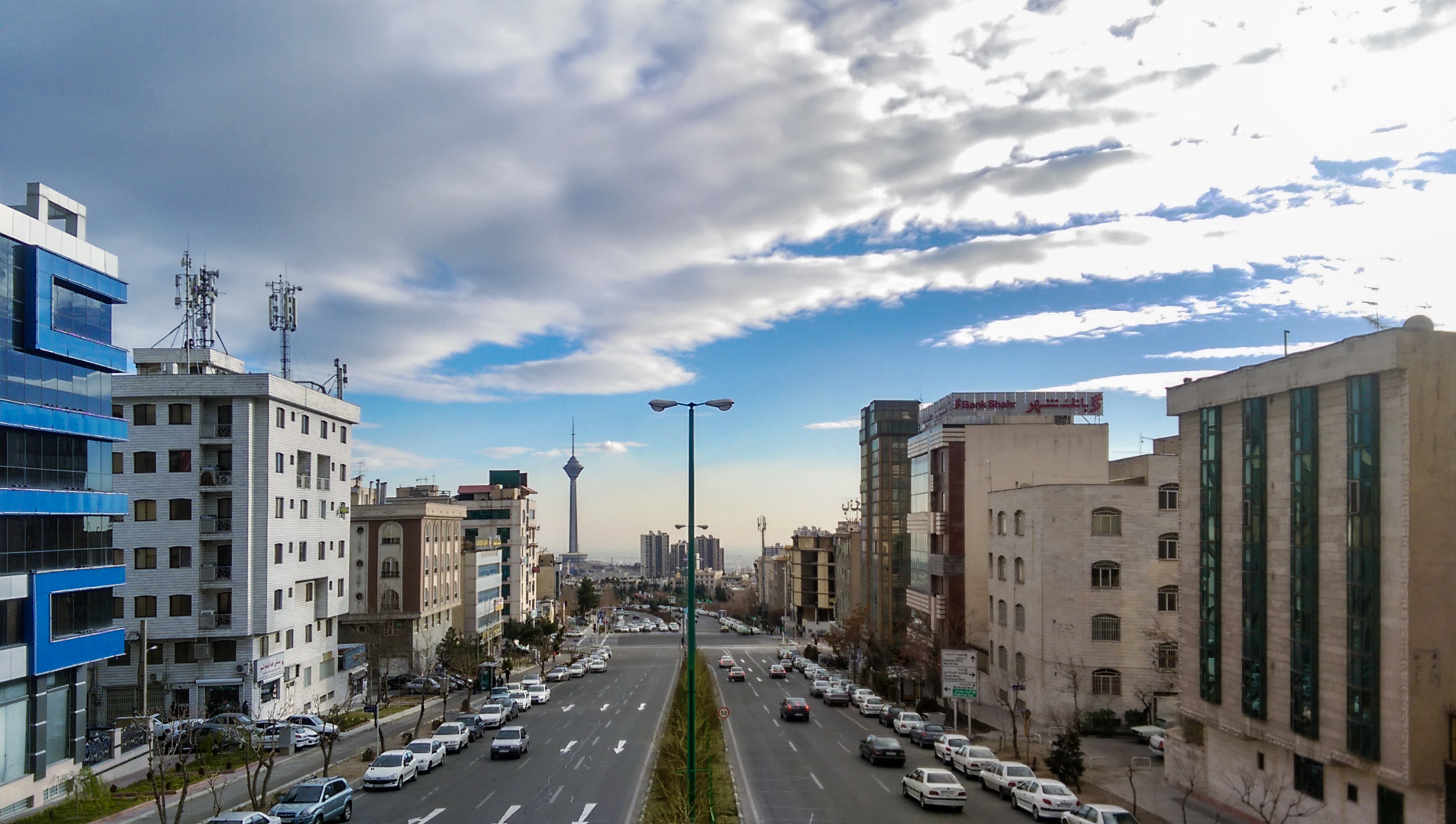 تصاویر از یک بلوار در سعادت آباد که از روی پل عابر پیاده گرفته شده.